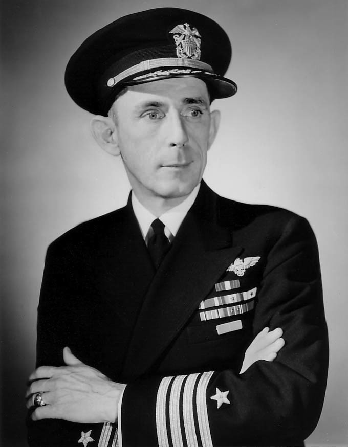 CAPT Daniel V. Gallery